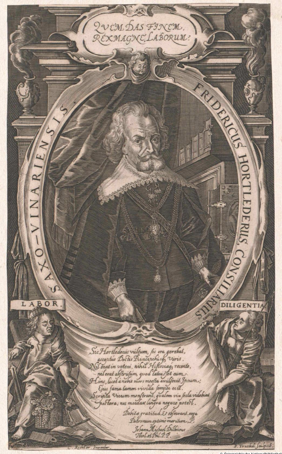 Bildnis der Historikers Friedrich Hortleder (1579-1640) von Christian Richter (1587-1667)